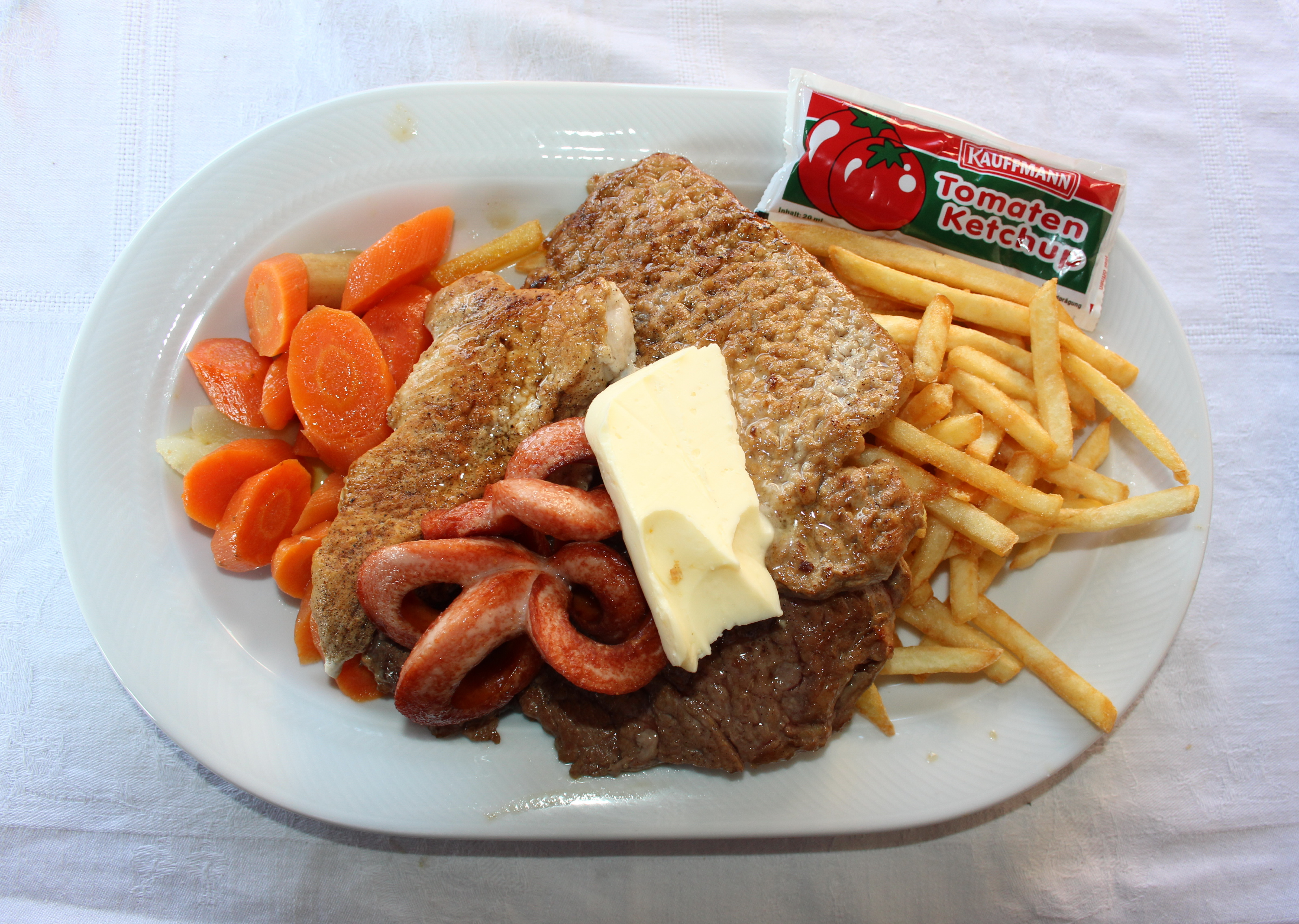 Grillteller mit Pommes frites